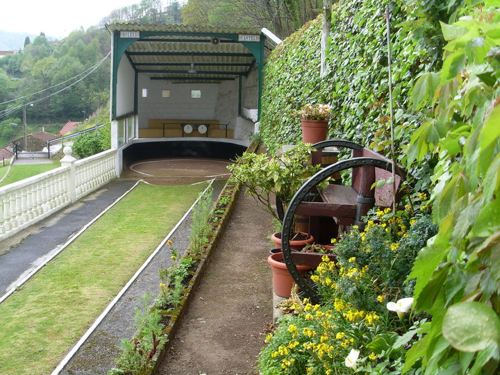 bolera de cuatreada en el pulliu